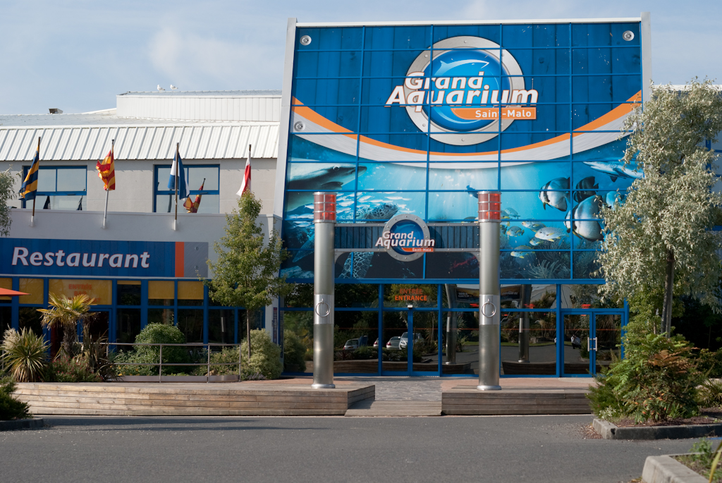 L'entrée de l'Aquarium de Saint-Malo